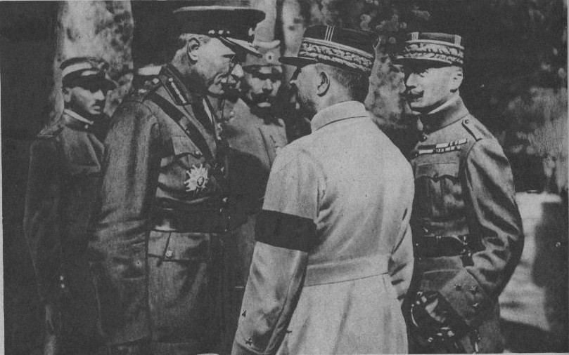 le Miroir N°242, page 6 montrant les généraux Milen, Franchet d'Espeérey et Henrys en Macédoine.